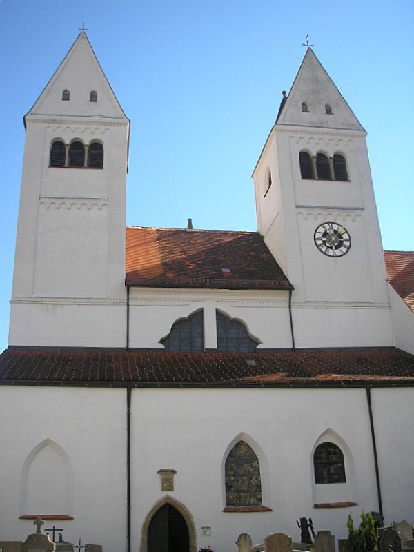 Klosterkirche St. Johannes d. T. (Steingaden, Oberbayern). Westfassade. Eigene Aufnahme, Sept. 2006 / Steingaden Monastery (Upper Bavaria, Germany). West front of the church of St. John Baptist. Own photo, Sept. 2006